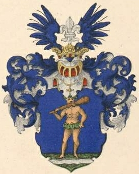 Strandmanni suguvõsa aadlivapp